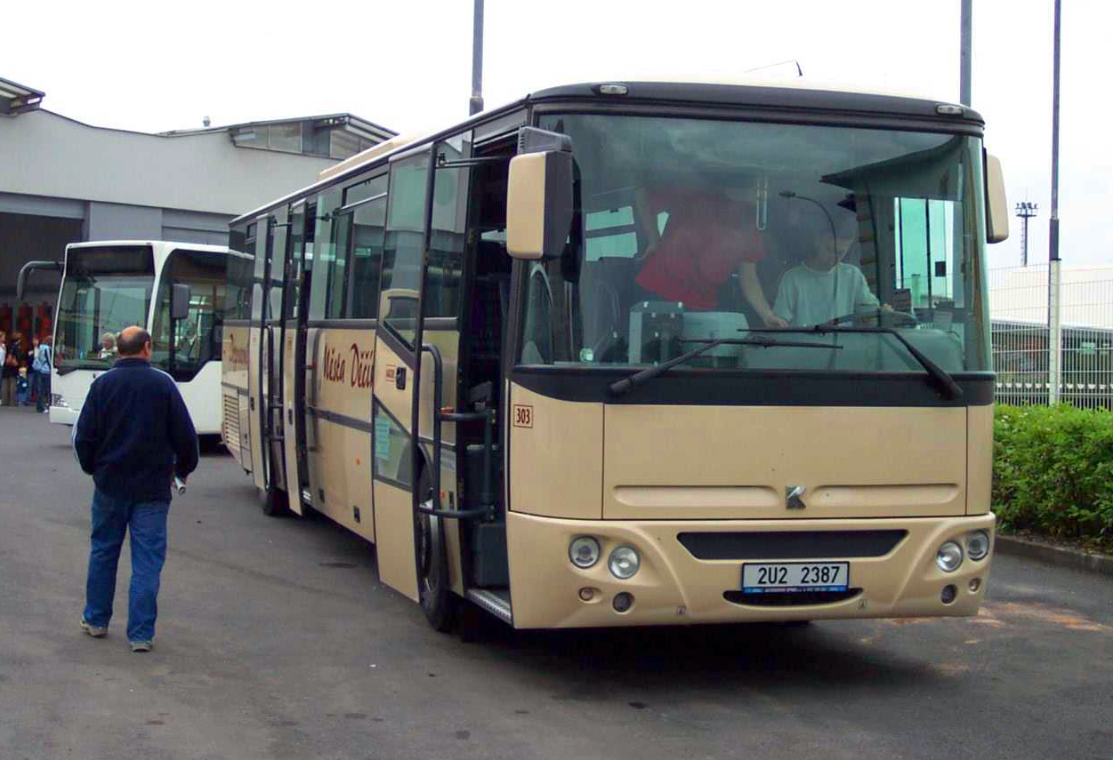 Karosa Axer Dopravního podniku města Děčína